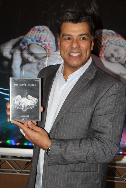 Maurício Mattar